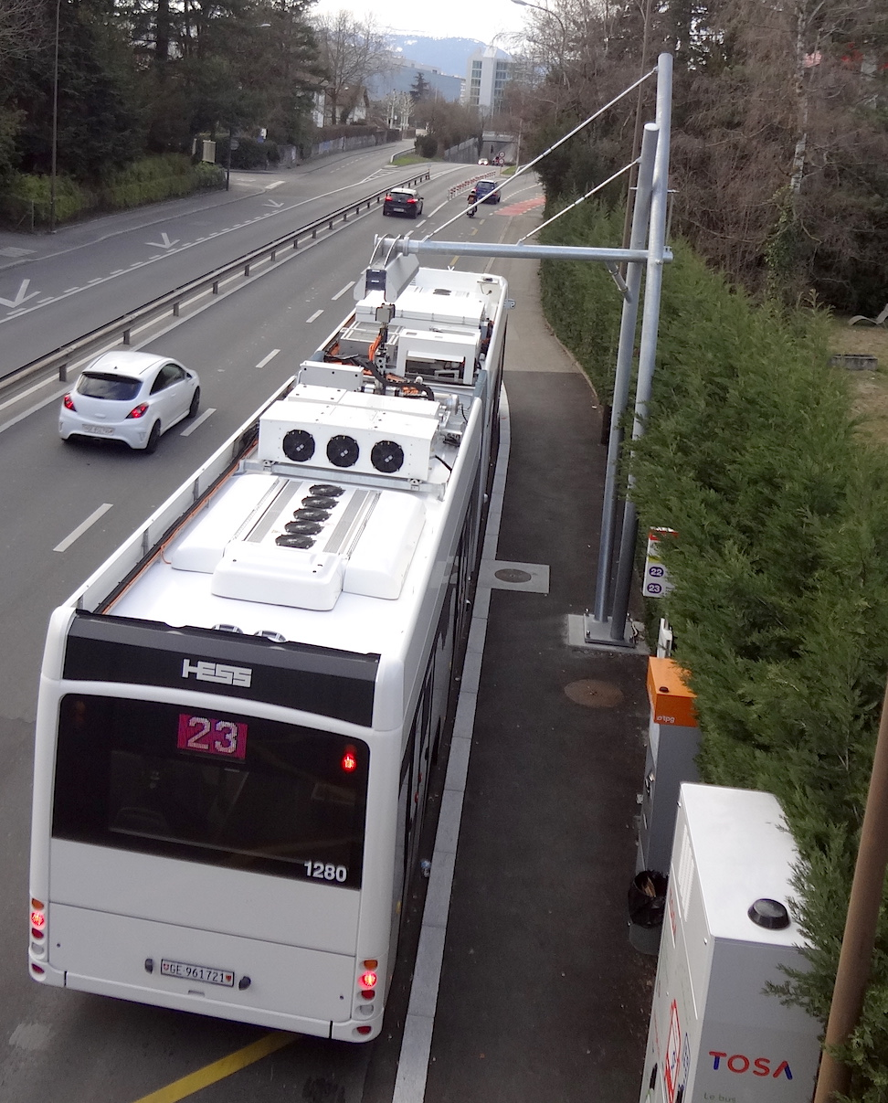 Bus 23 à l'arrêt Pré-Monnard au Petit-Lancy. Le bras repliable situé sur le toit, guidé par un capteur laser pour le branchement, est visible.